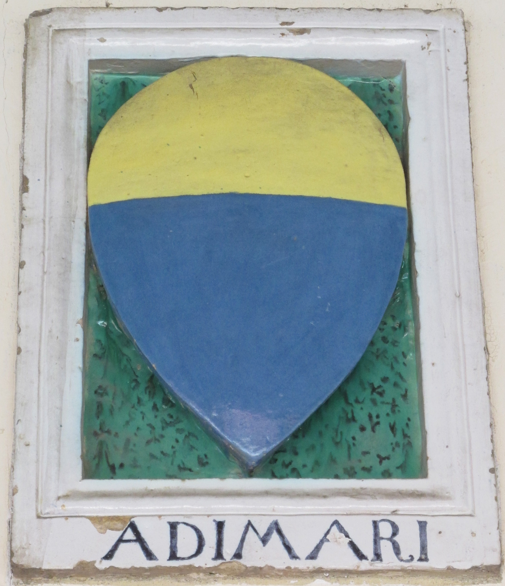 Empoli, chiostro della collegiata, stemma adimari, bottega di andrea della robbia, fine XV sec, da s. m. a ripa